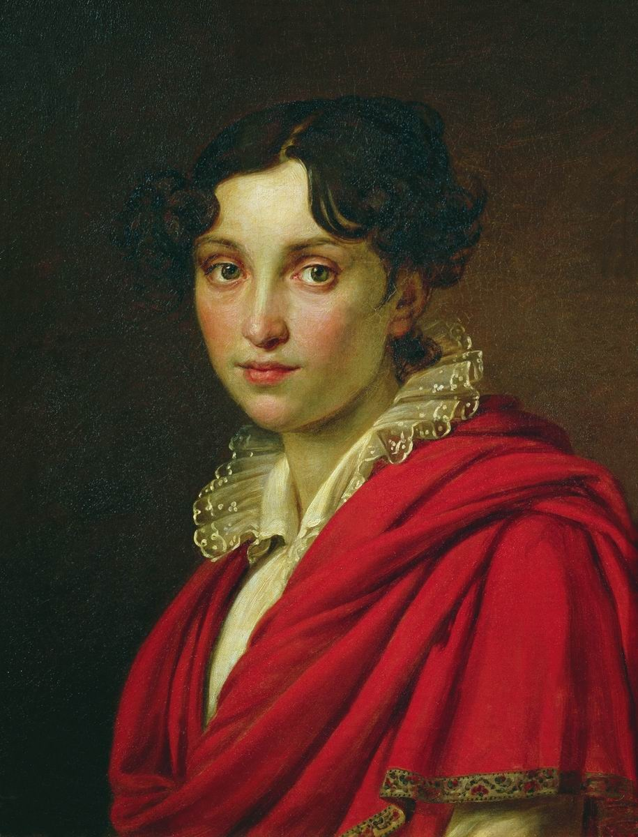 Русская школа. «Портрет М.С. Хатовой». 1824 г. Новгородский историко-художественный музей